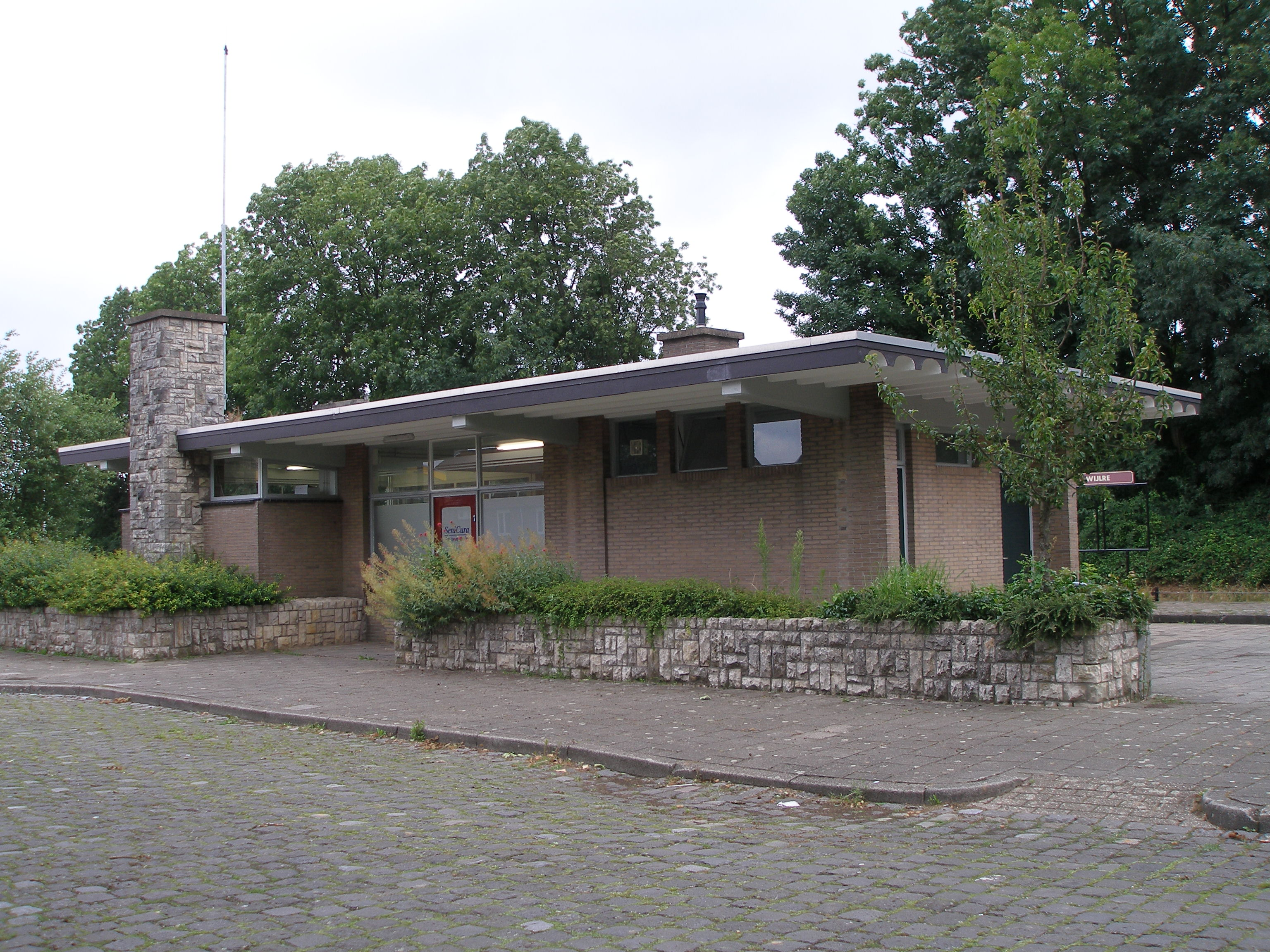 Station Wijlre-Gulpen in 2008